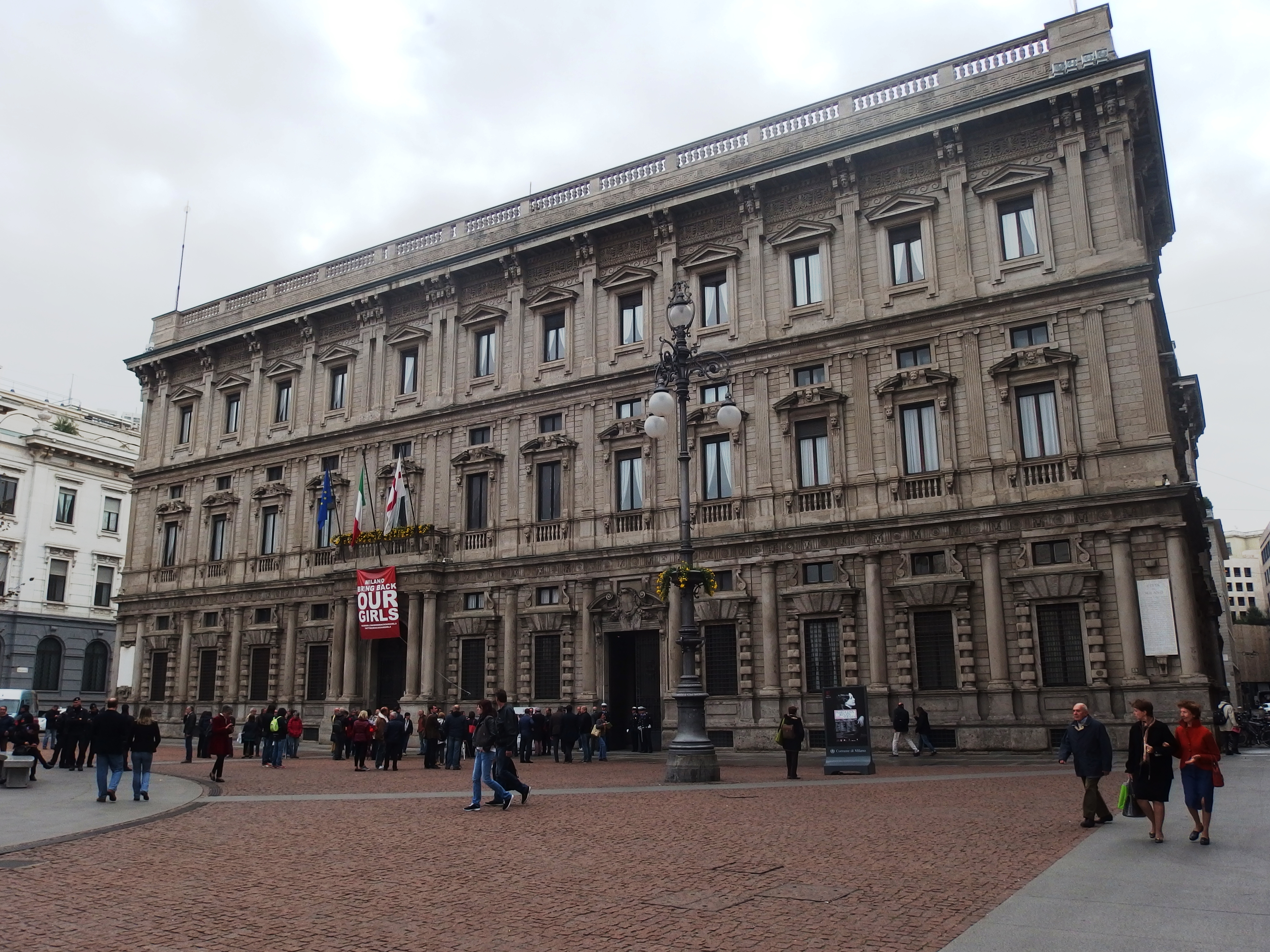 Milano, Palazzo Marino